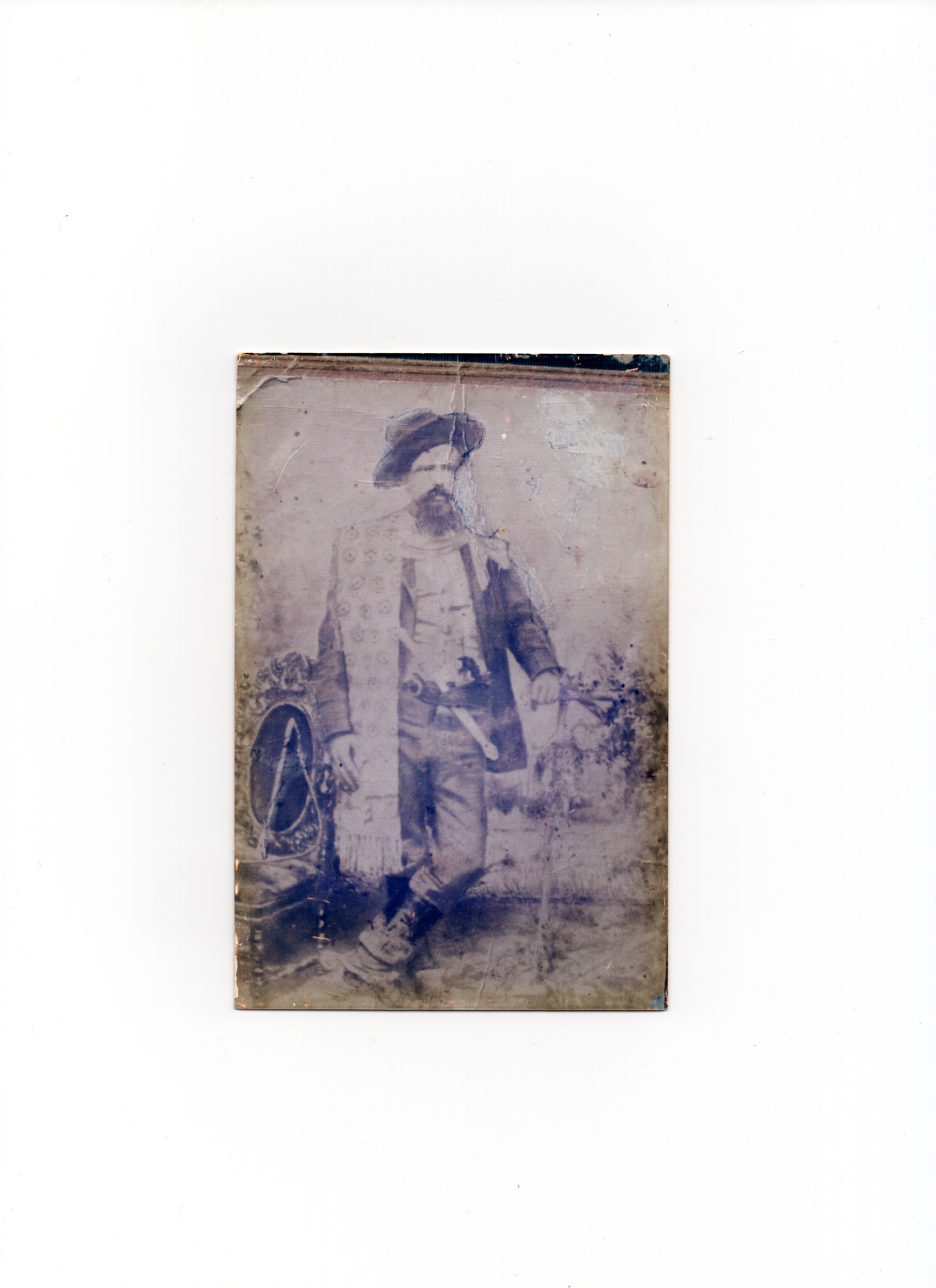 Fotografia de posse de descendentes do bisneto de Gumercindo filhos de Gelson Silveira Saraiva (falecido em 27/04/2009), residentes em Caçapava do Sul - RS.